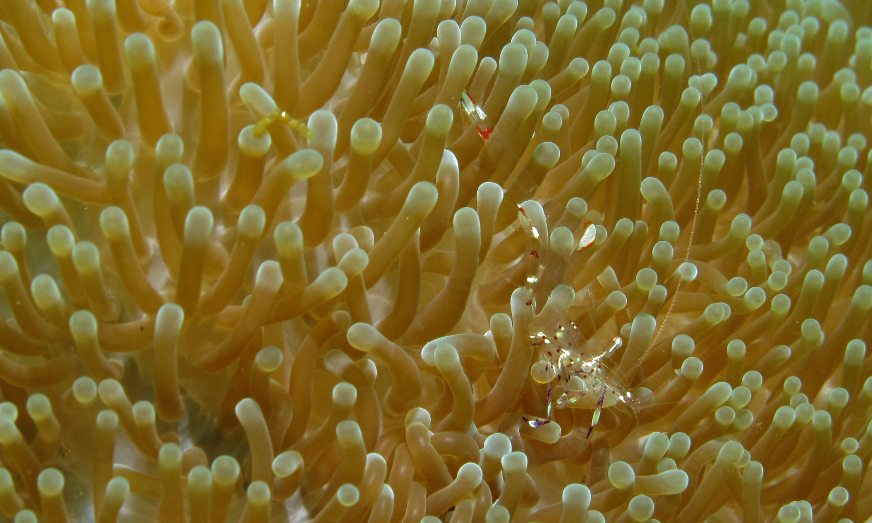 Retak Larry, Lembeh Strait, Sulawesi, INDONESIA